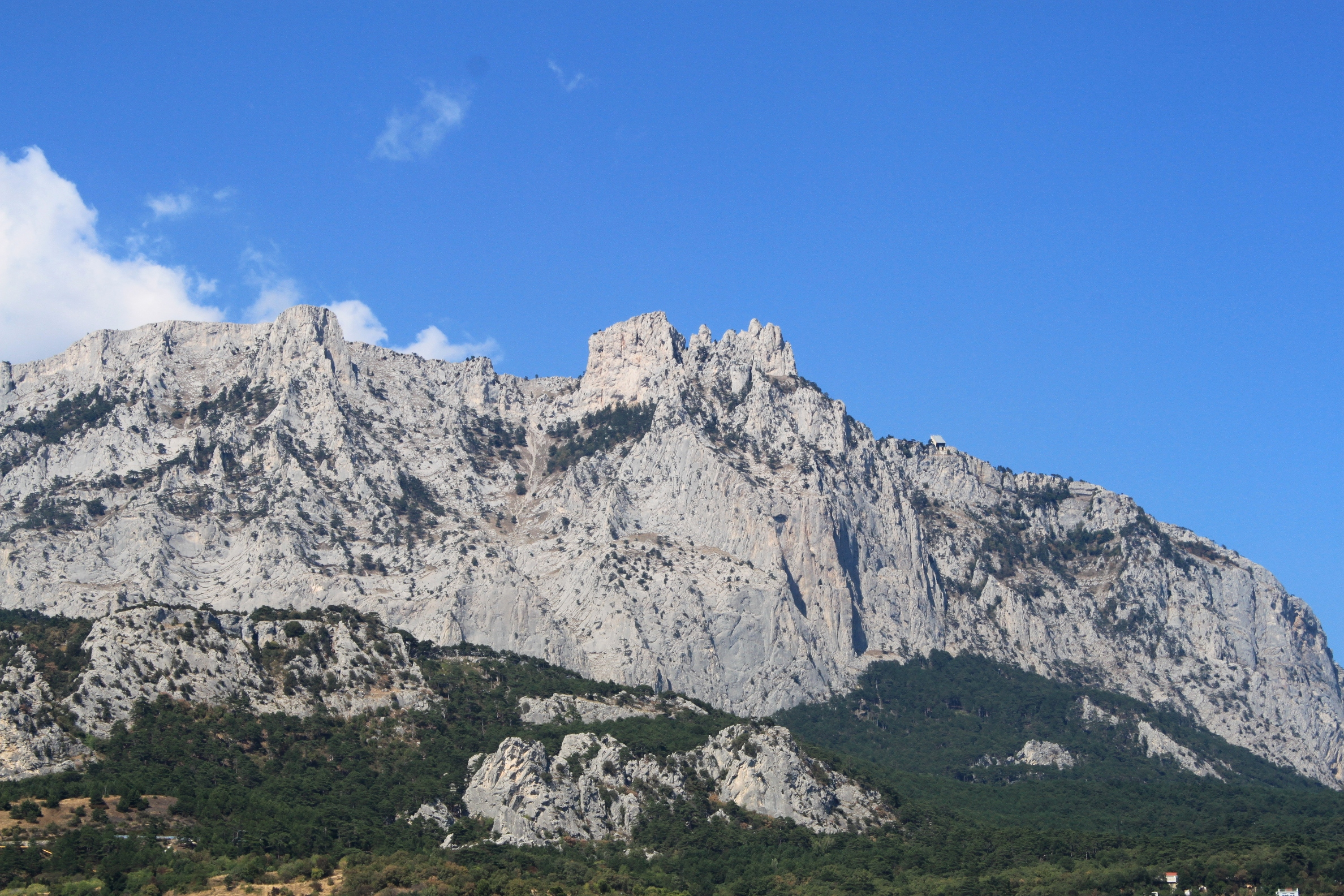 Вид с моря